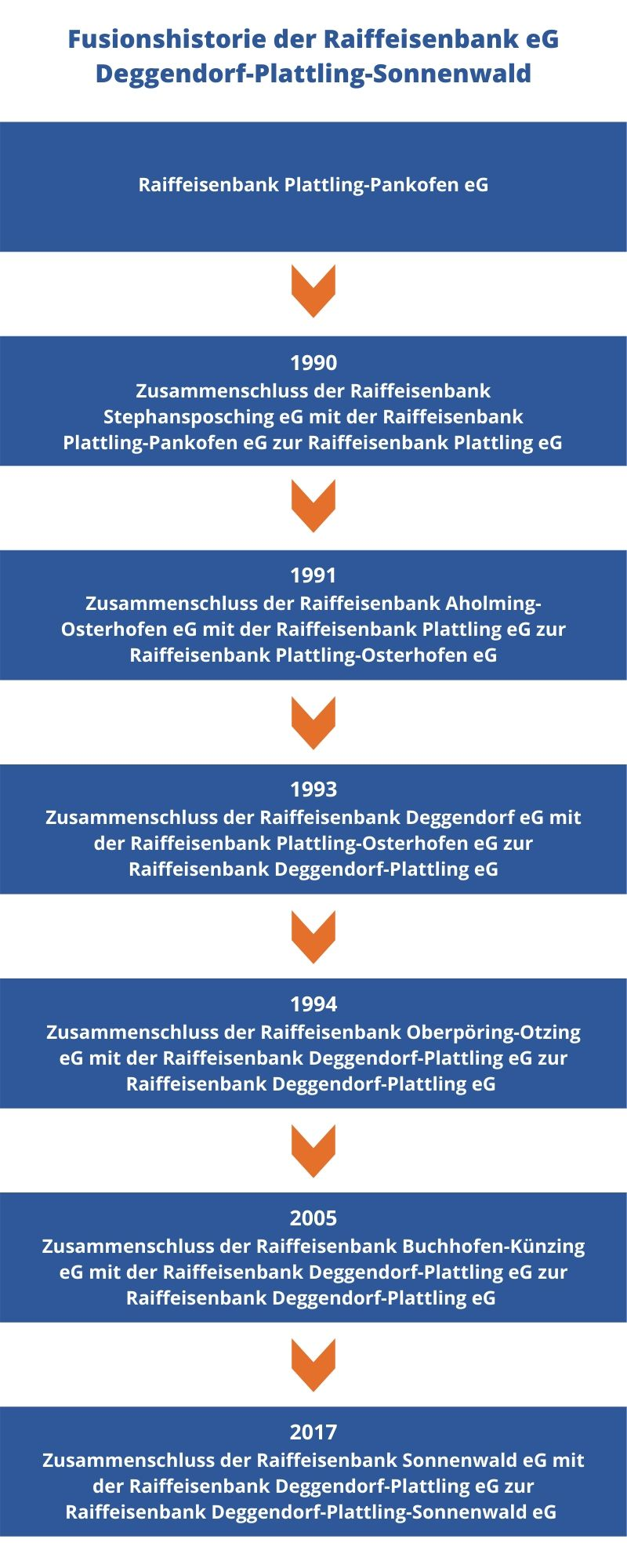 Chronik der Fusionshistorie der Raiffeisenbank eG Deggendorf-Plattling-Sonnenwald